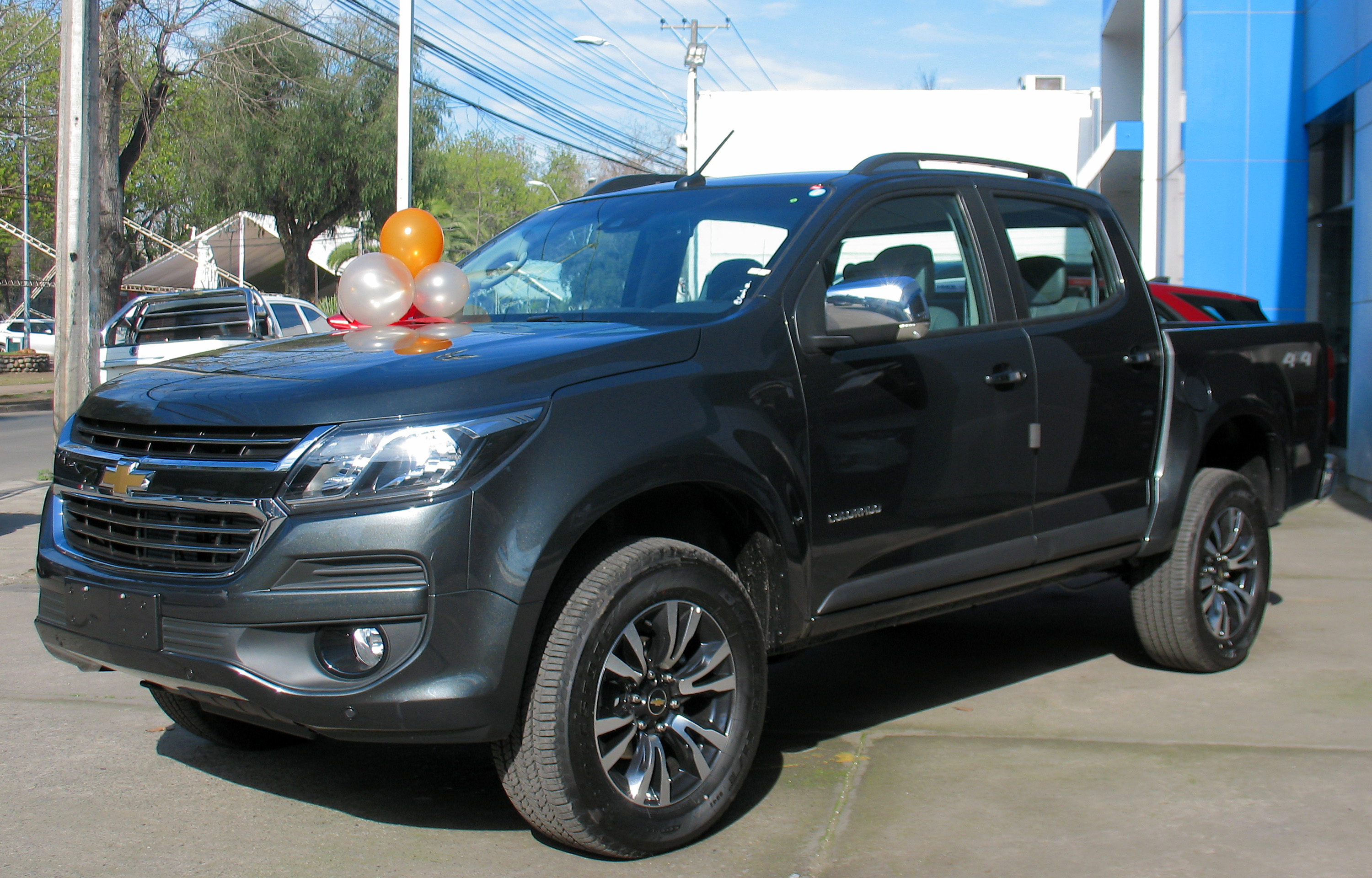 Chevrolet Colorado LTZ 2.8 TD 4x4 2018